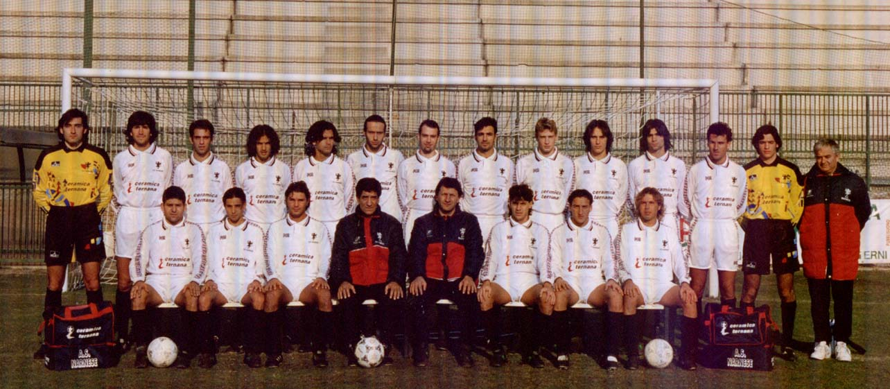 La Narnese 2° classificata nel Campionato Nazionale Dilettanti gir. F 1995-96 - In alto da sin.: Mercadante, Mainardi, Feliziani, Santececca, Guadagnoli, Marcucci, Di Palma, Scarfini, Rossetti, Parravicini, Cotugno, Berardi, Cano, Ruggeri (Mass.). In basso da sin.: Lanternari, Carbone, Graziani, De Lucia (Prep. Portieri), Sesena (All.), Mercuri, Faiola, Tarsi.